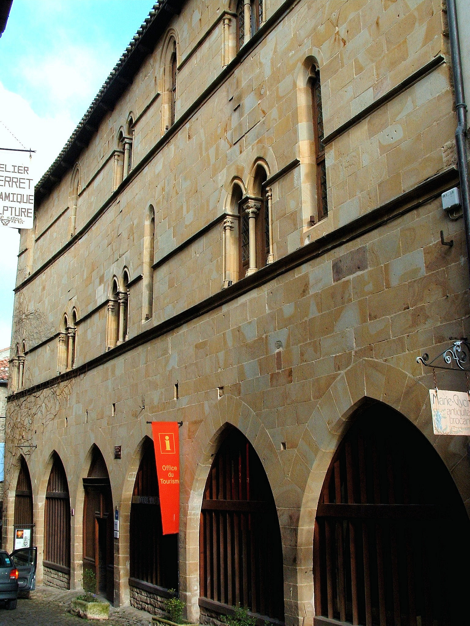 Cordes-sur-Ciel - Maison Fonpeyrouse